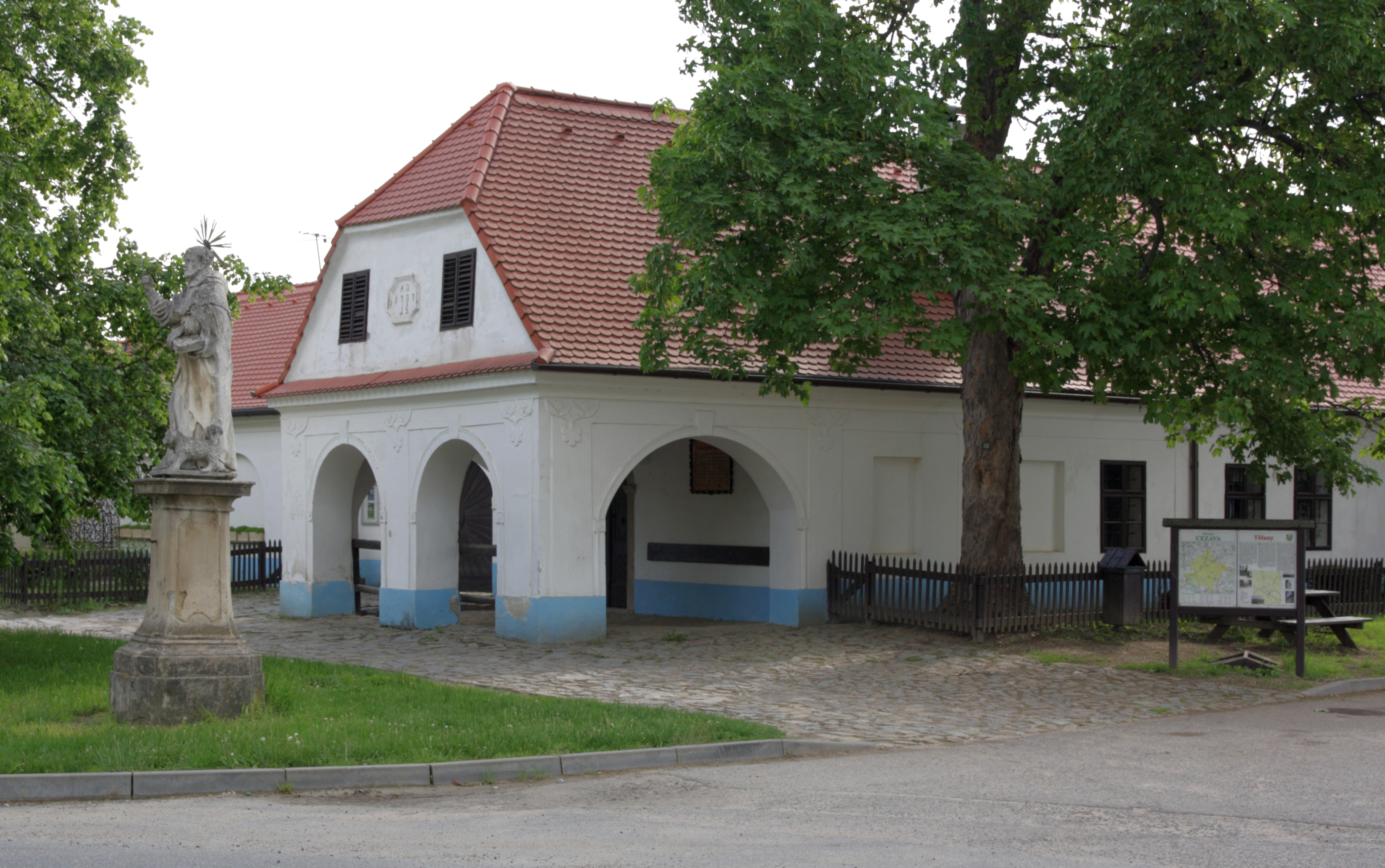 Těšany - barokní kovárna.